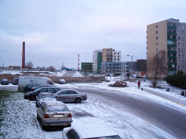 Laki I kvartali (Kadaka asum) uus arendus ala. Tallinn